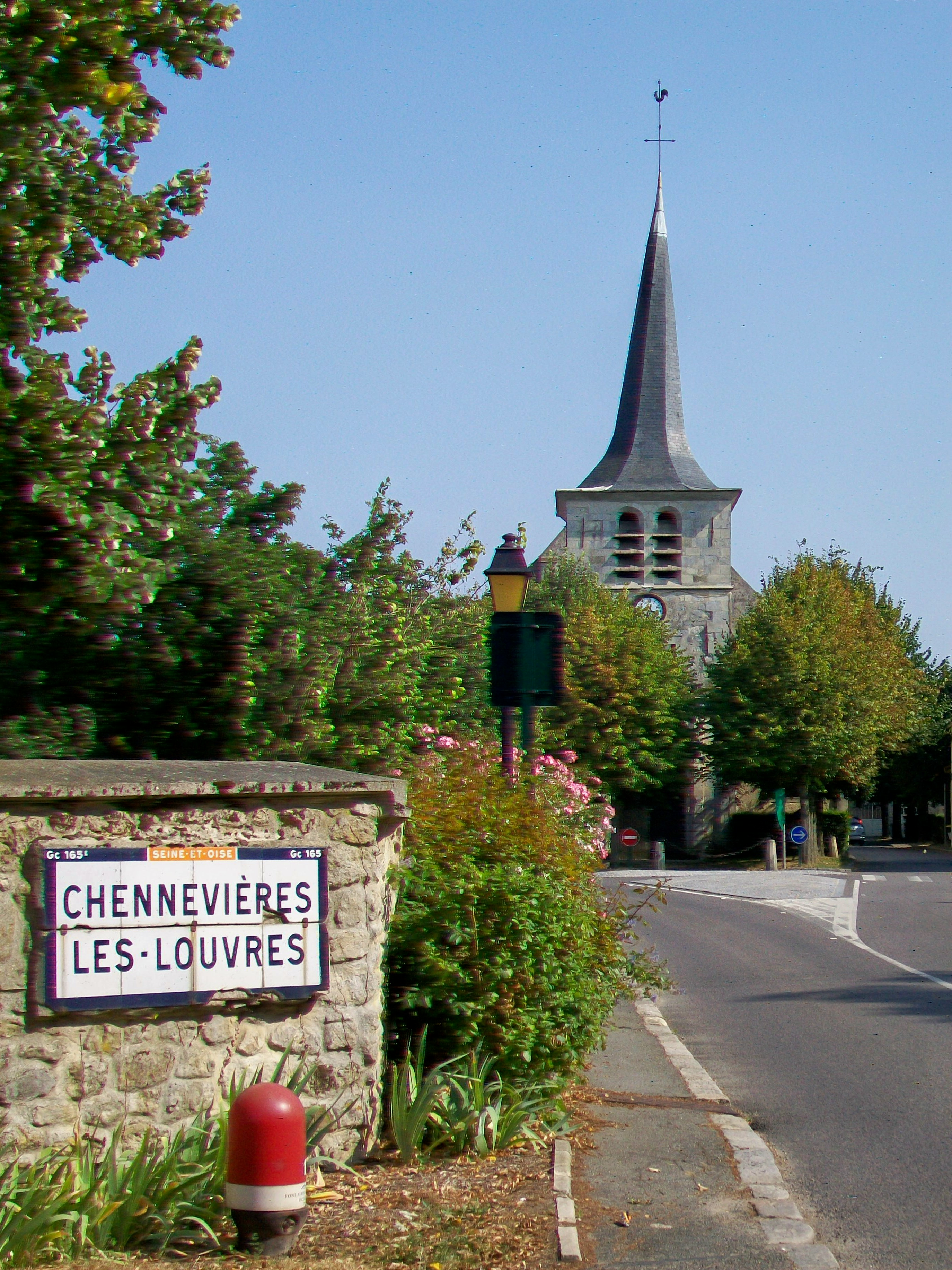 Rue de Louvres, vue sur l'église, plaque Michelin de 1932.